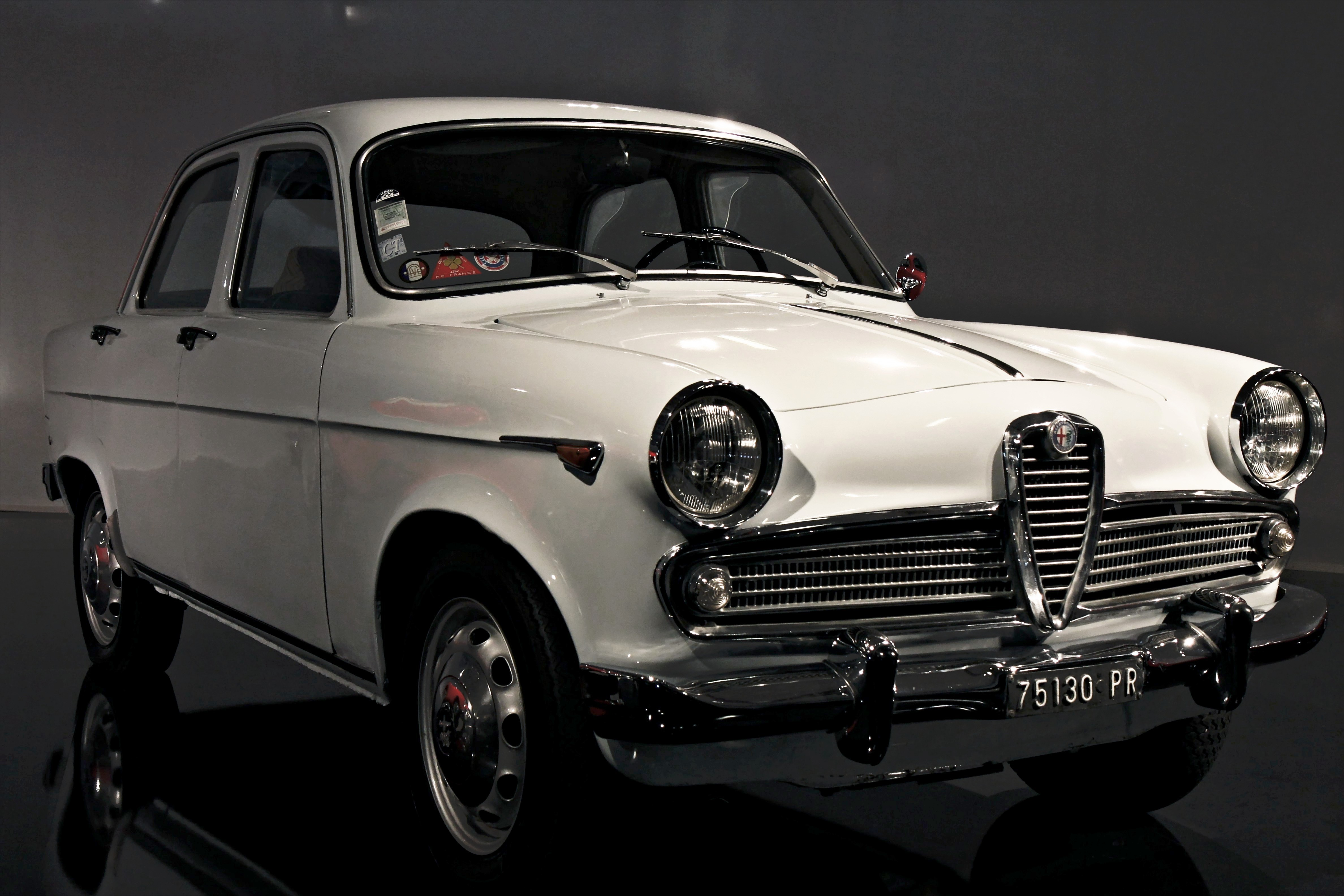 Alfa Romeo Giulietta 3ª serie del 1961